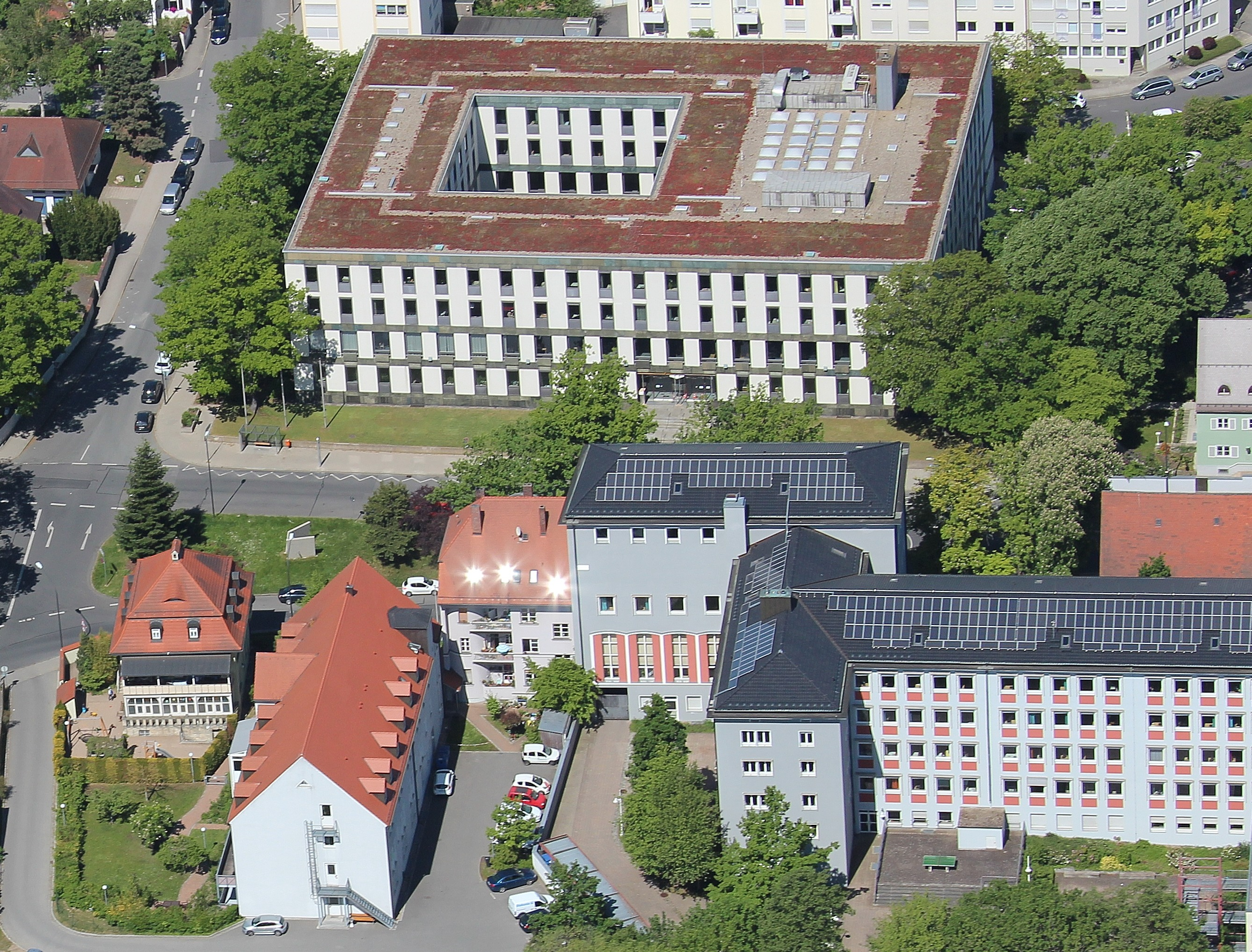 Weiden in der Oberpfalz, Bayern; Landgericht Weiden (Bildmitte oben), Wirtschaftschule (ehemaliges Bischöfliches Studienseminar, rechter Bildrand unten), Ledererstraße, Sebastianstraße